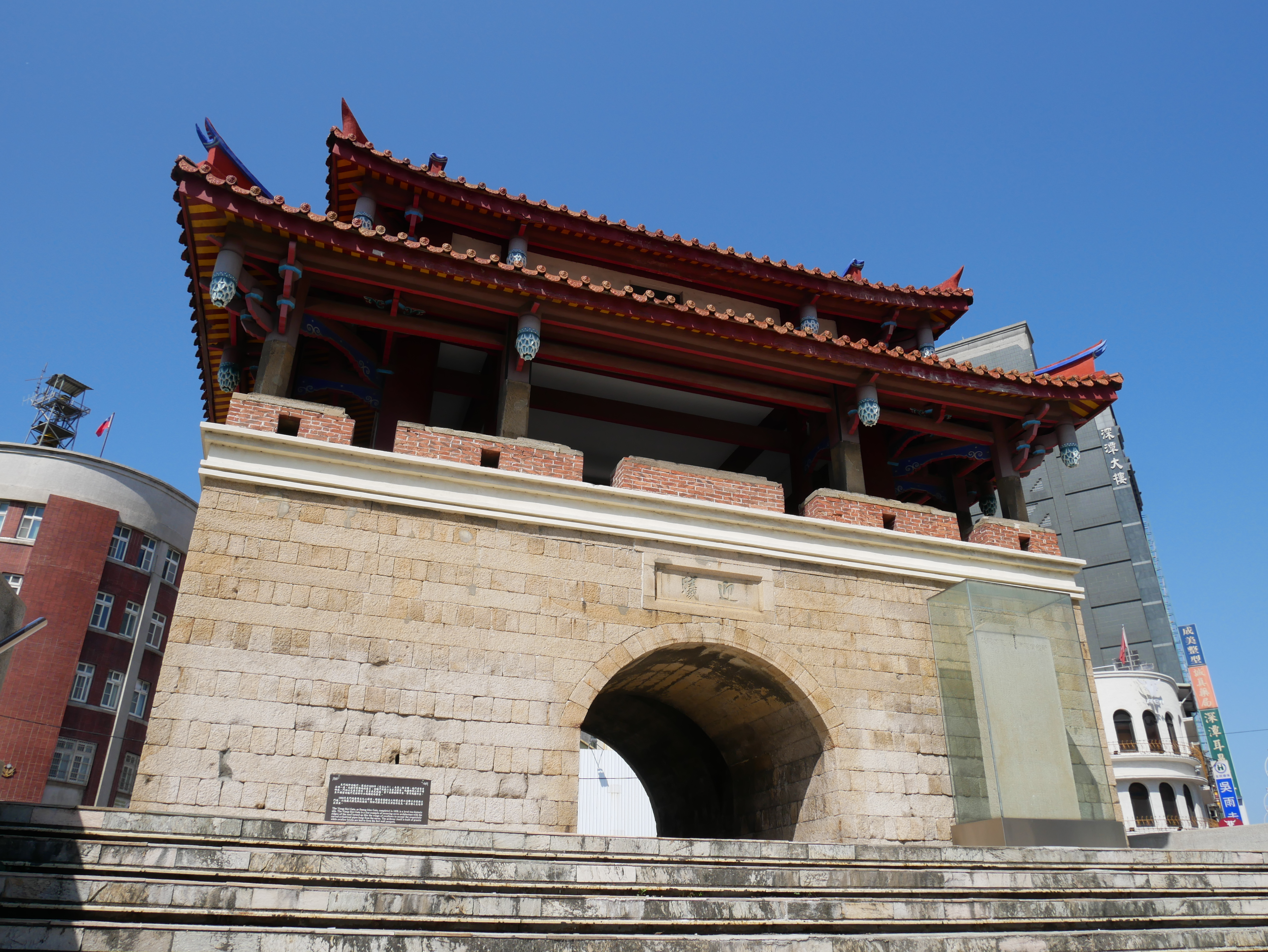 中文（台灣）: 竹塹城迎曦門，新竹市東區東門聯里中正里